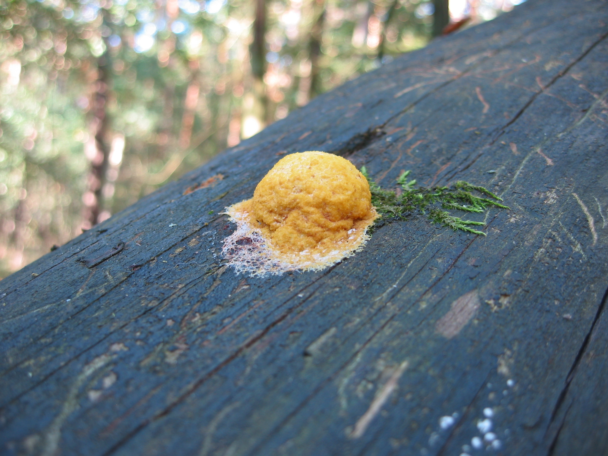 Schleimpilz im Wald bei Niederglaucha